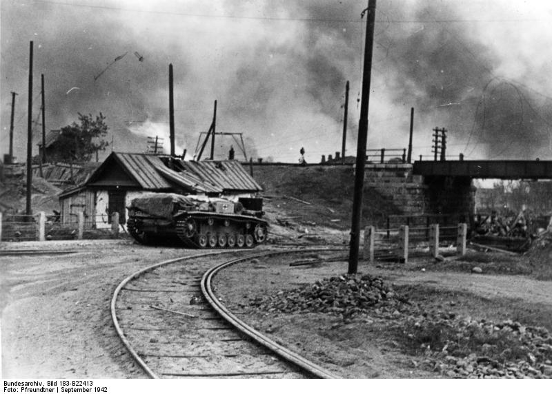 Russland, Kampf um Stalingrad, Zerstörungen Scherl: Panzergrenadiere rollen in Stalingrad hinein Scherl Bilderdienst (Pfreundtner) 15.10.42 [Herausgabedatum] ADN-ZB/Archiv II. Weltkrieg 1939-1945 Deutsch-sowjetische Front: Ein Panzer der faschistischen deutschen Wehrmacht während der Kämpfe um Stalingrad. (Aufn.: Ende September 1942/Pfreundtner) [Sowjetunion.- Schlacht um Stalingrad.- Sturmgeschütz III (StuG III)] Information added by Wikimedia users. Сталинград. Тихорецкая ветка Владикавказской железной дороги. Расположение: современные улицы Краснознаменская/Голубинская/Новороссийская. Дальний трамвайный путь идёт на Медведицкую (Новороссийскую) улицу. Туда ходил не только трамвай, но, и в конце XIX века - конка. В настоящее время не сохранился. Остановка на этом трамвайном перекрестке именовалась "Кладбищенские стрЕлки" - из-за воспоминаний о находившемся на территории нынешнего Горсада крупнейшего царицынского кладбища.